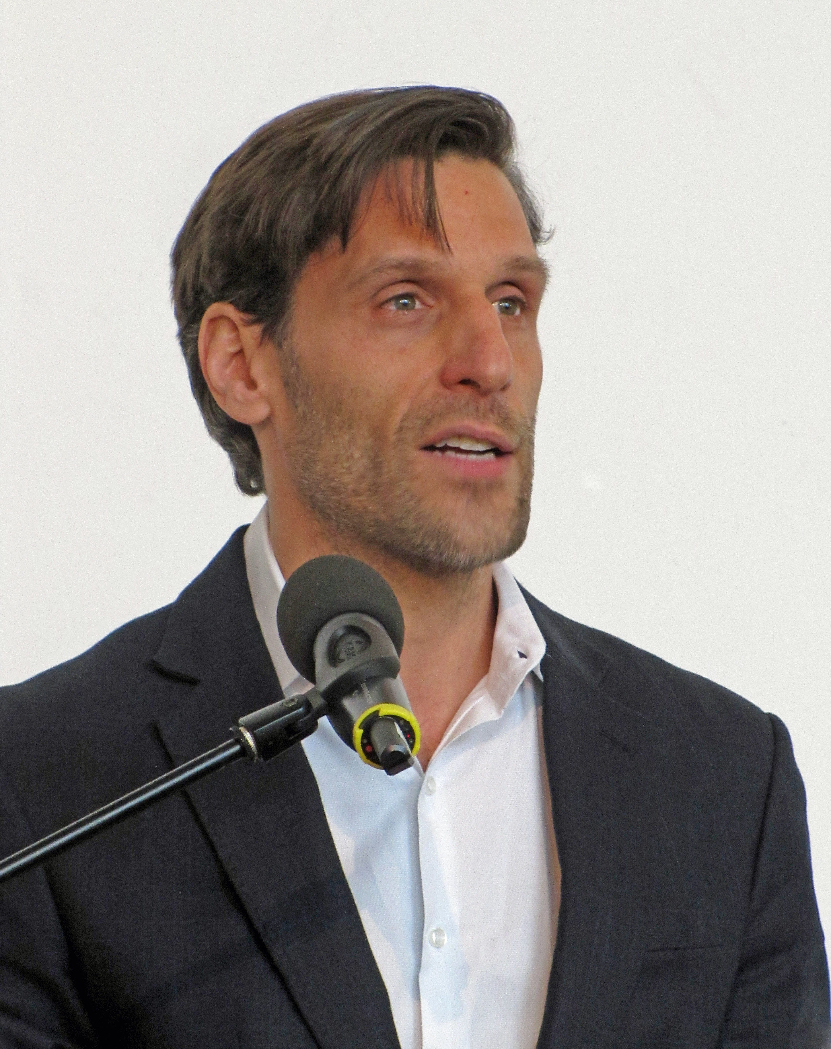 Philipp Hübl, bei den 45. Römerberggesprächen, Thema:Die Ohnmacht der Aufklärung und der Erfolg des Autoritären, im April 2017 im Chagall-Saal der Städtischen Bühnen in Frankfurt am Main.